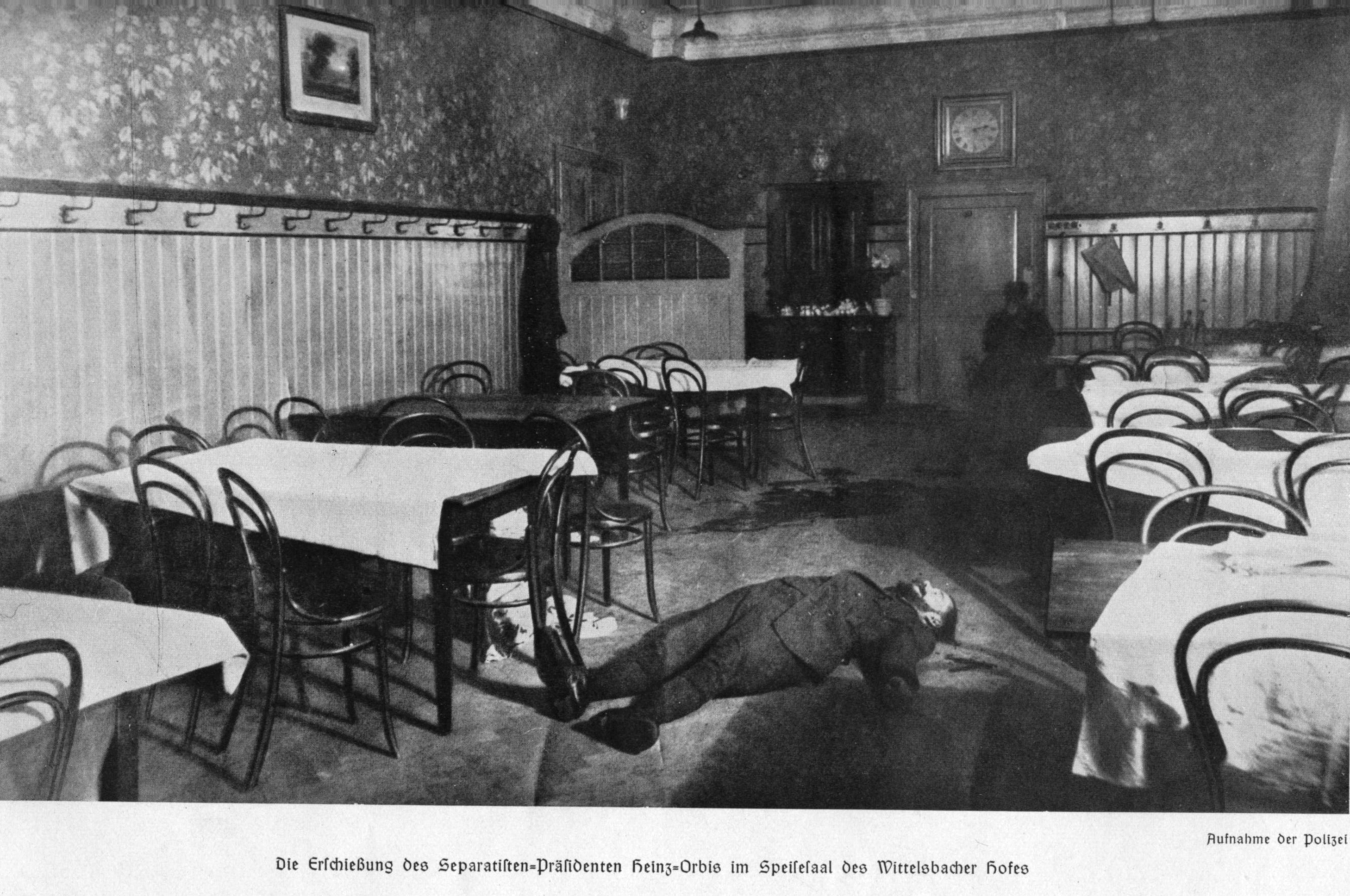 Separatisten-Präsident Franz Josef Heinz, genannt Heinz Orbis, erschossen in Speyer, 9.1.1924